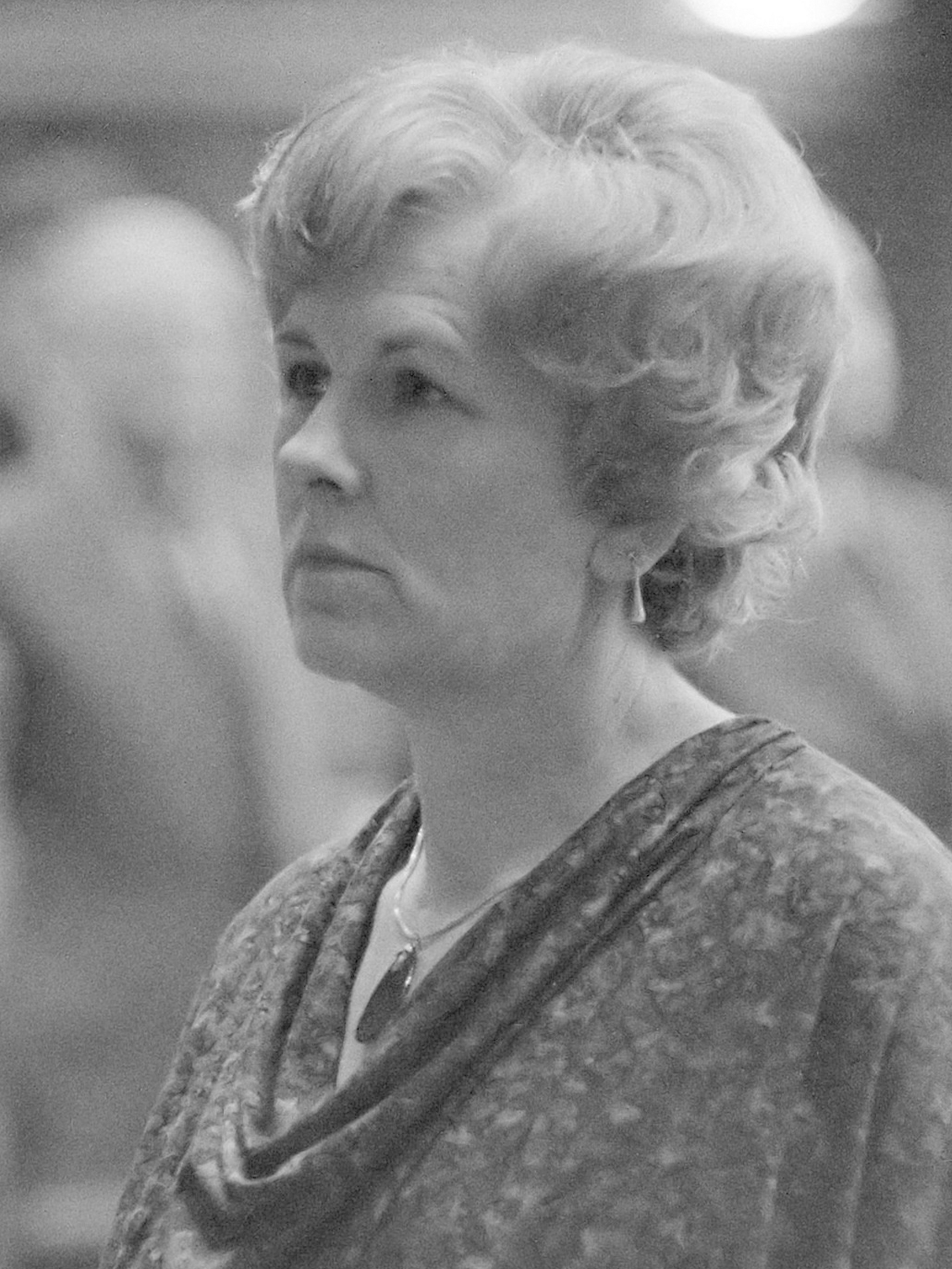 Eerste Kamer , mevrouw Vonhof-Luijendijk (echtgenote van de burgemeester van Utrecht) beedigd als VVD-Kamerlid 24 januari 1978